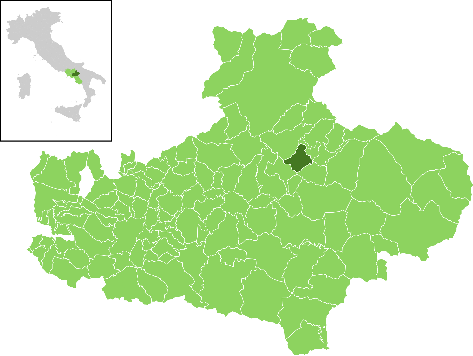 Il comune all'interno della provincia di Avellino